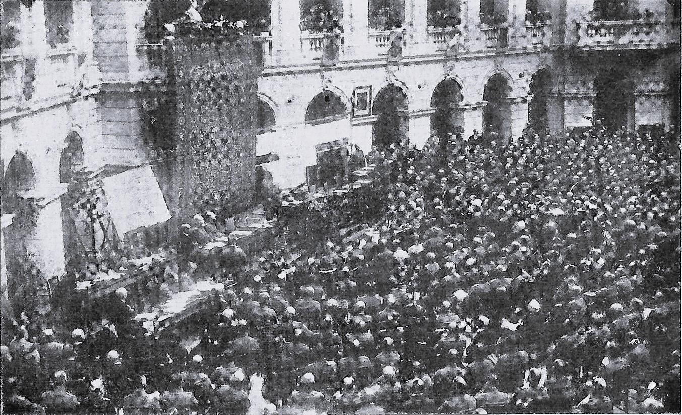 Eine Sitzung des Kongresses für Innere Medizin. Der Kongress fand am 1. und 2. Mai 1916 in Warschau statt.